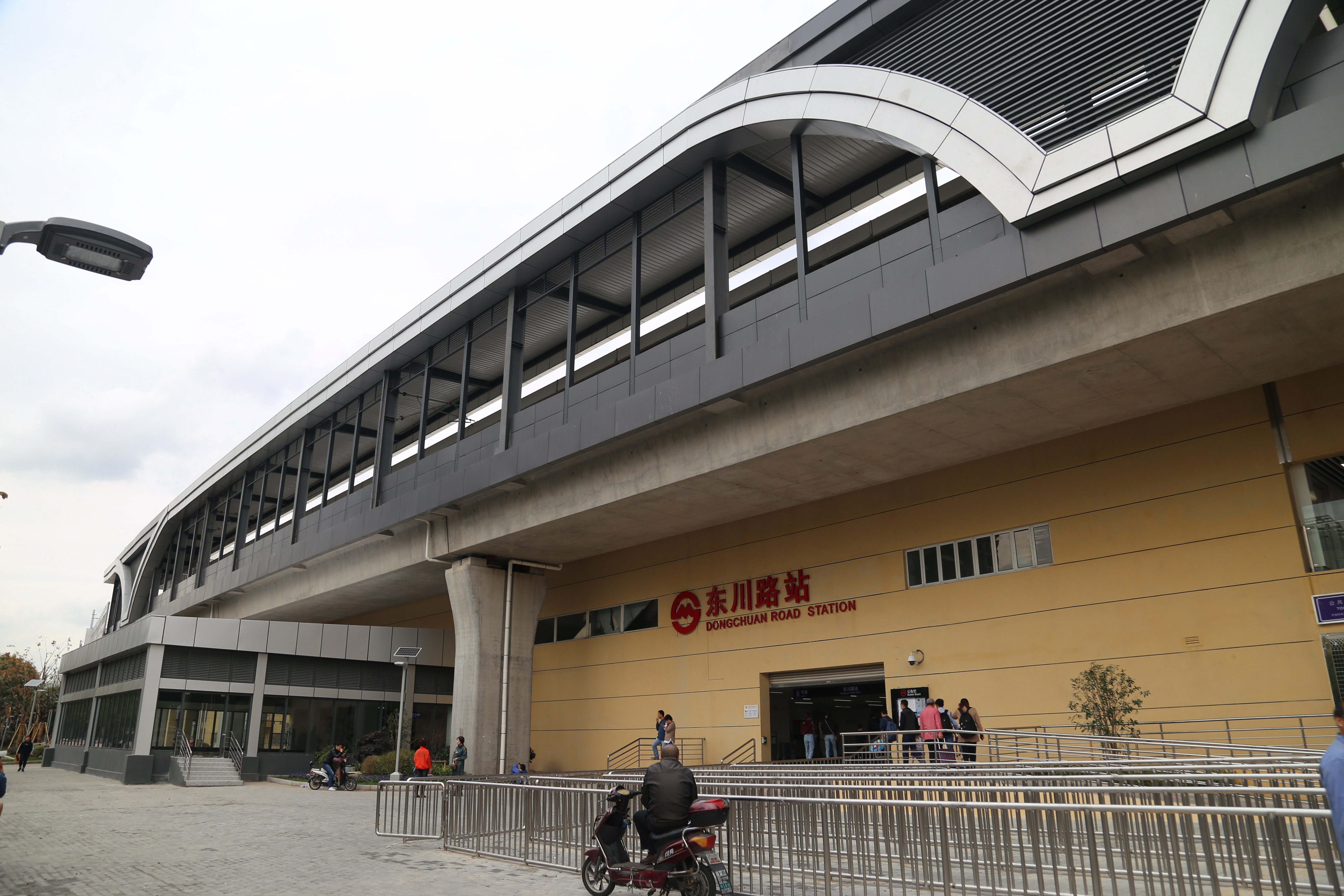 2018翻新后的东川路站站房